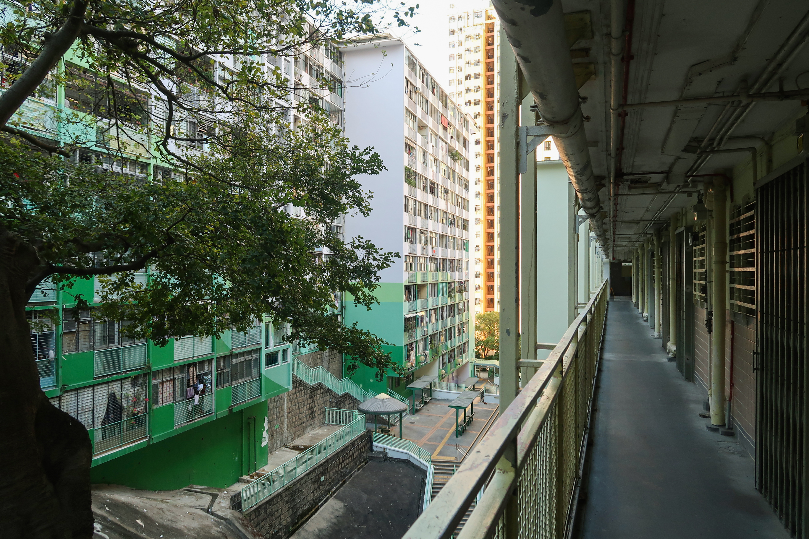 Sai Wan Estate